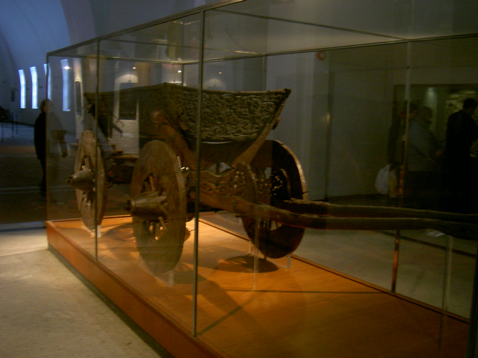 Carro vikingo encontrado en el barco de Oseberg, Oslo, Viking museum